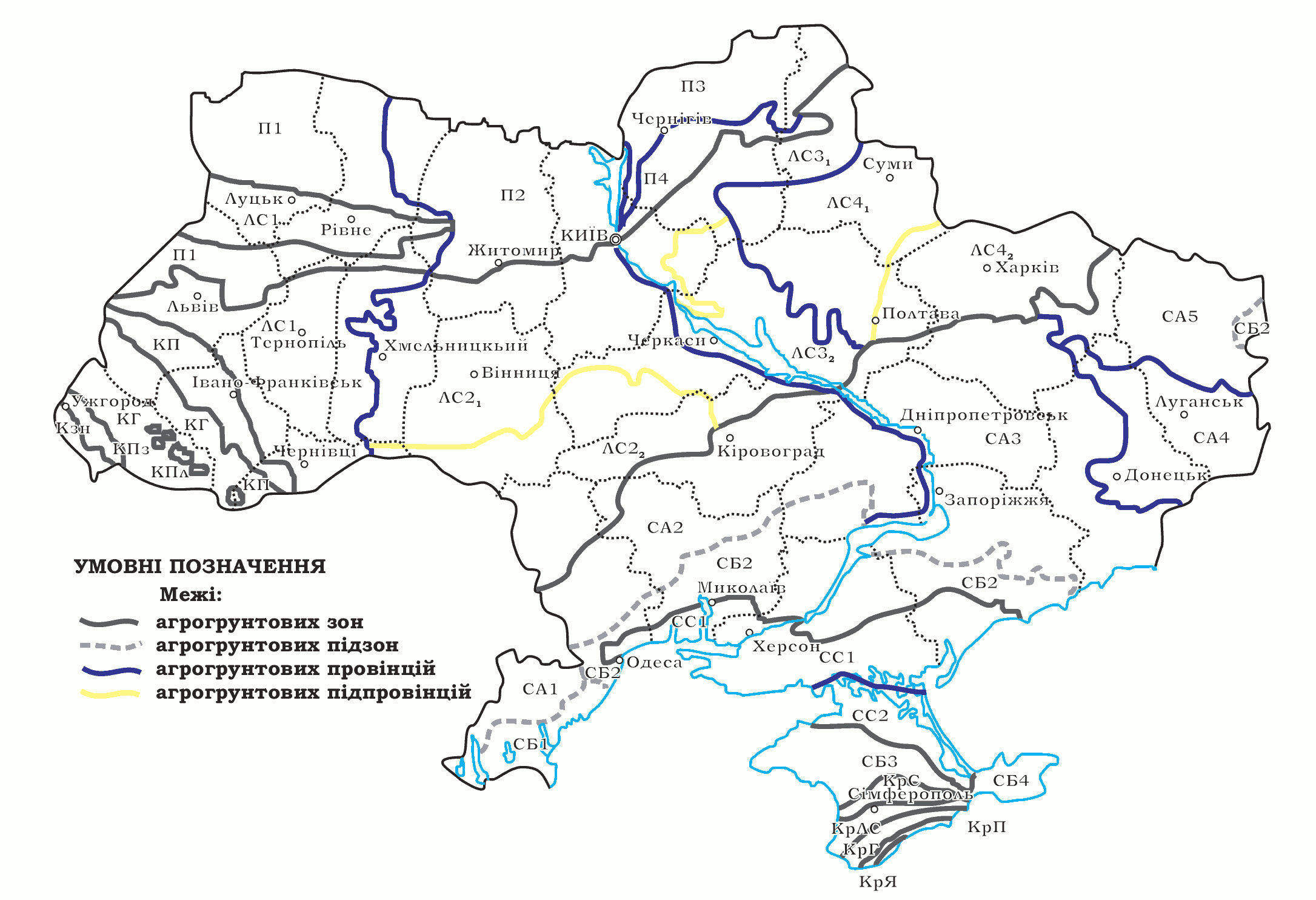 Створено на основі ґрунтової карти-схеми агроґрунтового районування УРСР